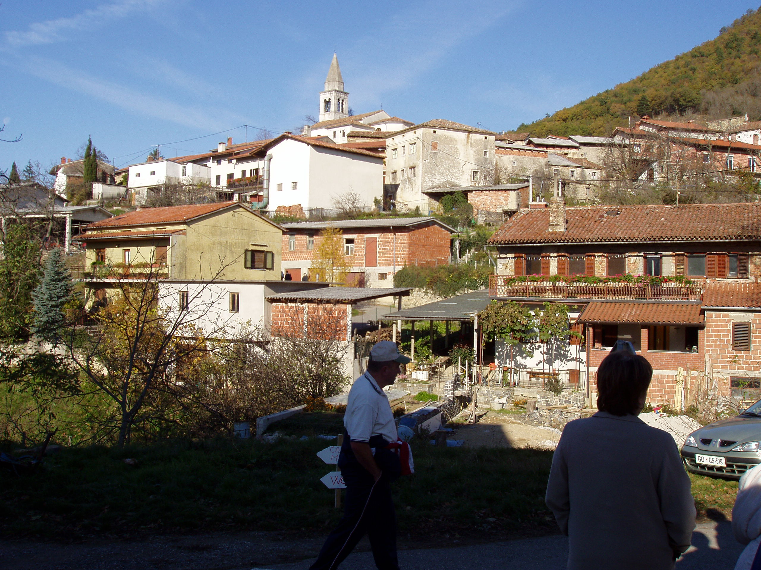 PB201820